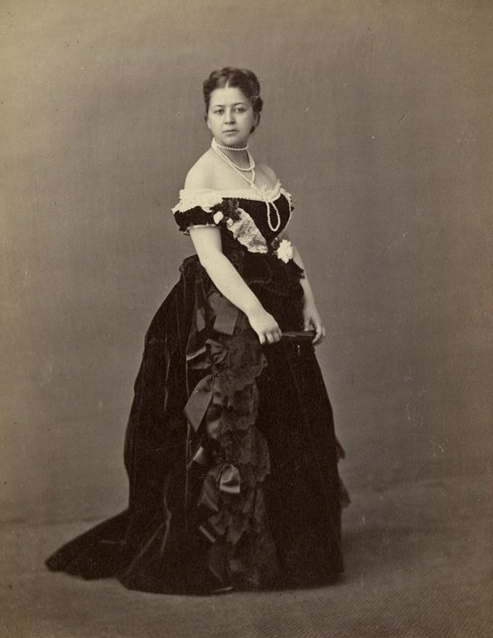 Елеyа Андреевна Третьякова, ур. Матвеева (1840— ?), вторая жена Сергея Михайловича Третьякова.